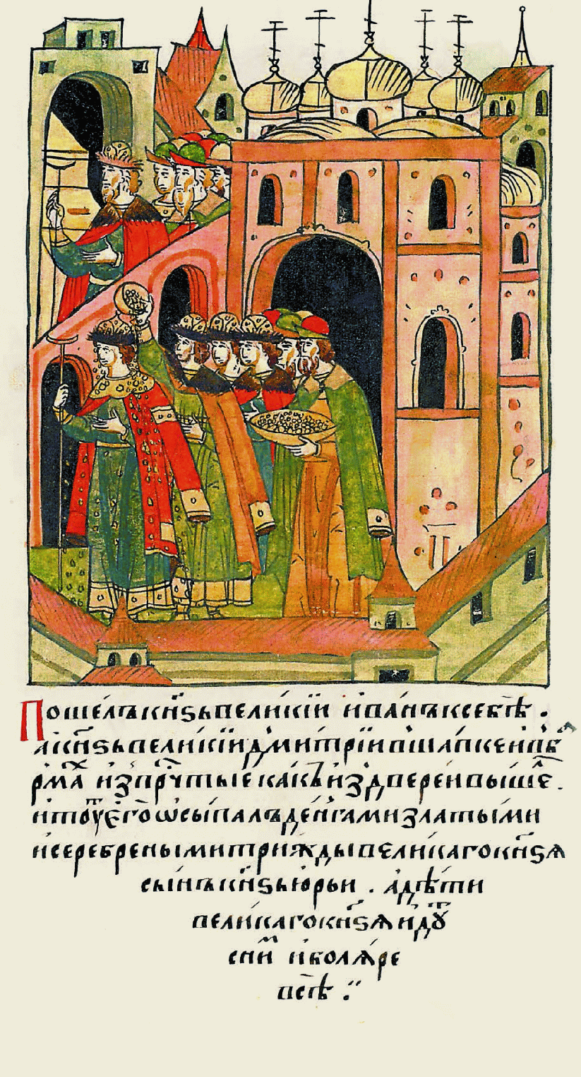 пошел великий князь Иван к себе, а великий князь Дмитрий в шап- ке и в бармах только как из дверей церкви Пречистой вышел, его тут же трижды осыпал золотыми и серебря- ными деньгами сын великого князя князь Юрий, а дети велико- го князя шли рядом с ним и все бояре